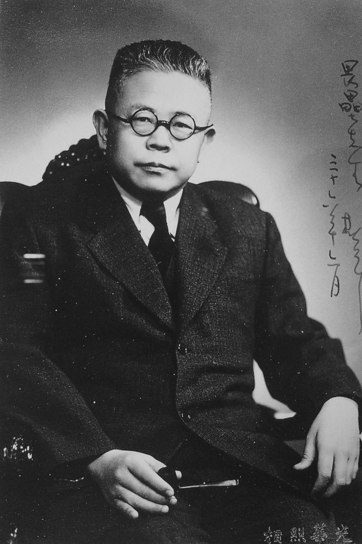 Fu Ssu-nien